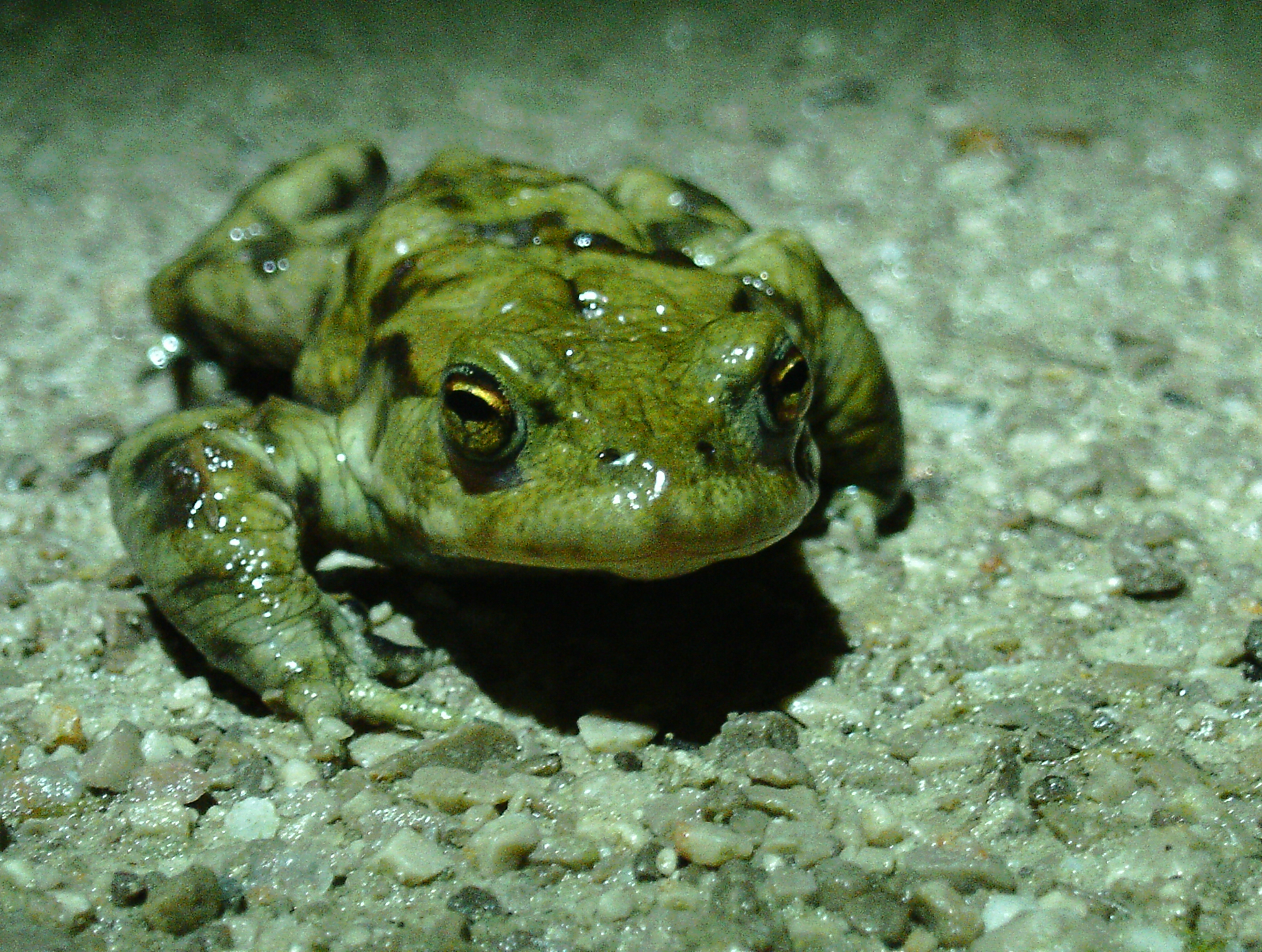 Crapaud commun Bufo bufo type vert clair avec tâches noir, pris avec éclairage led petzl tikka+ le 04/03/17 à Coudekerque Branche 59210 le long de l'A16